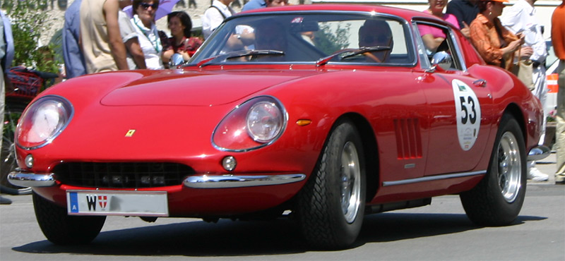 Ferrari 275 GTB 6 C (1966) Fotografiert von: Softeis bei der Präsentation der Fahrzeuge zum Gaisbergrennen in Salzburg; Juni 2004 GNU-FDL